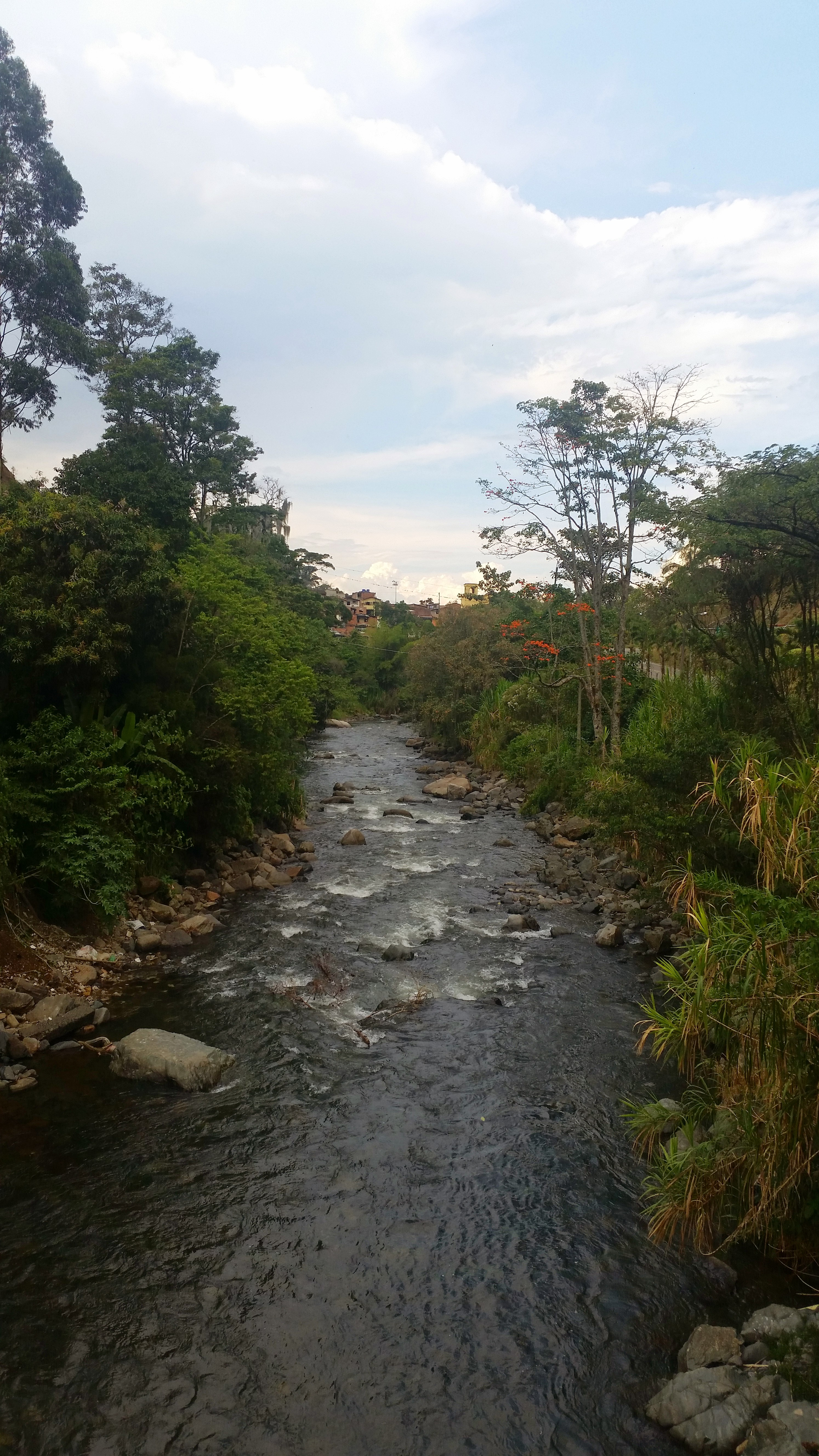 Rio San Juan en Casavieja Andes 1